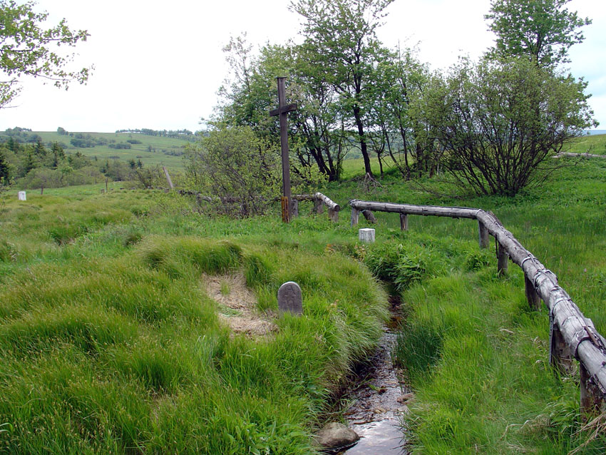 „Schwarzes Kreuz“ in Fürstenwalde/Sachsen (black cross)